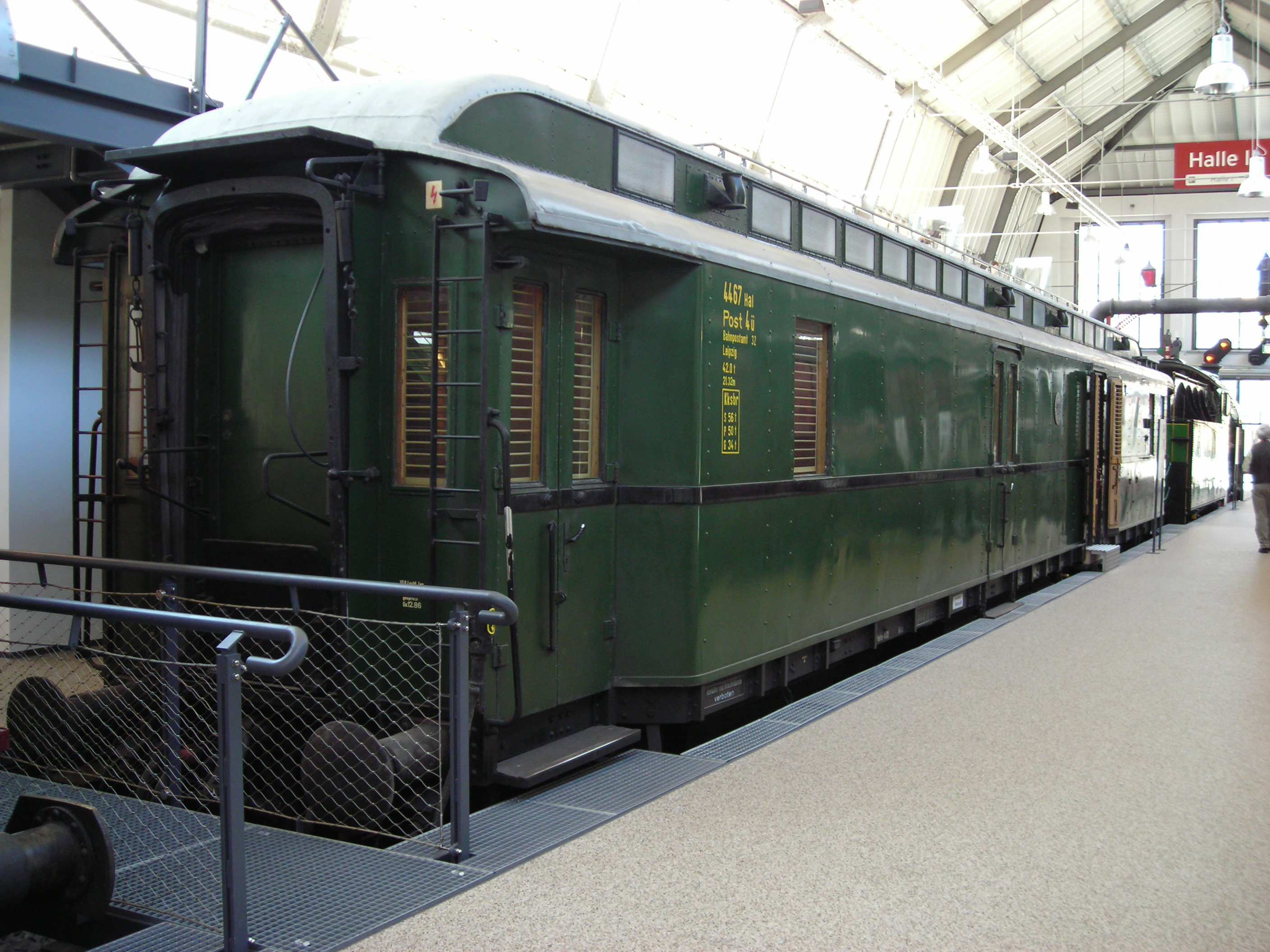 Bahnpostwagen für Personenzüge, Nr. 4467 (Hersteller: Christoph & Unmack AG, Baujahr 1933): Gesamtansicht — zuletzt verwendet als Bahnpostamt 32 Leipzig — Exponat im Deutschen Museum Verkehrszentrum, Halle 2, Inv.-Nr. L2006-8 (Leihgabe des Museums für Kommunikation in Nürnberg)